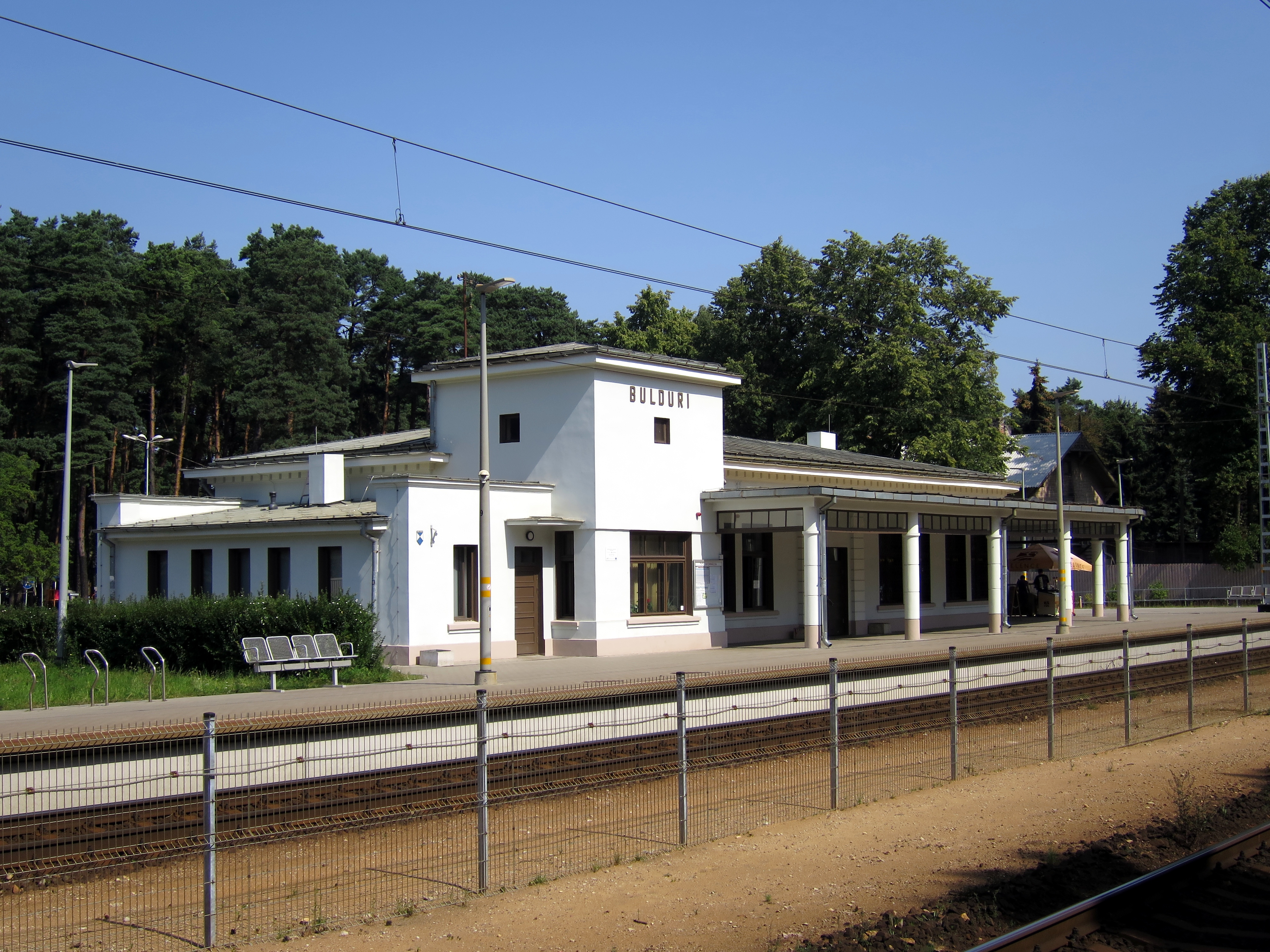 Bulduru stacijas ēka